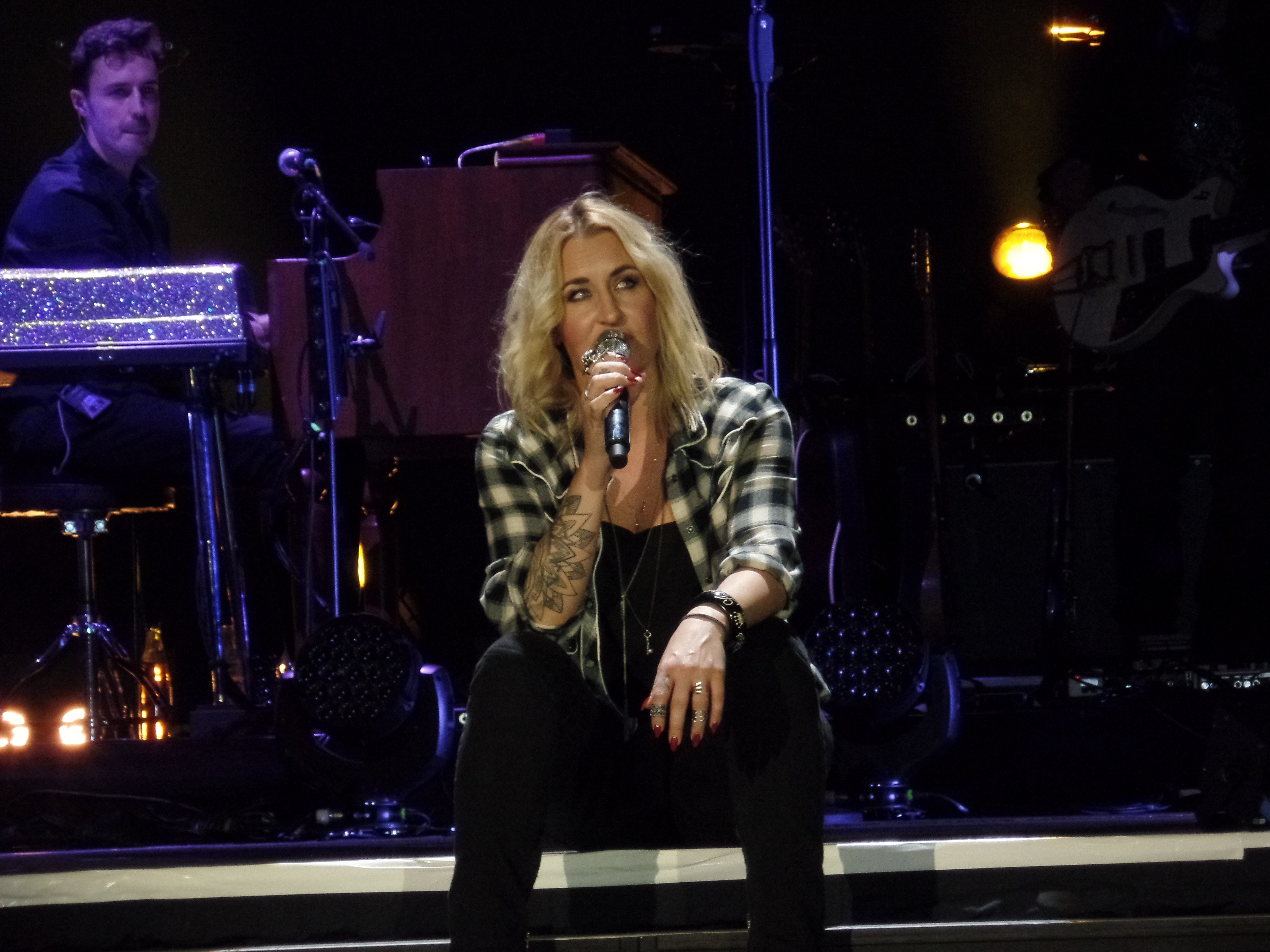 Sarah Connor während ihrer Muttersprache-Tour in Bremen